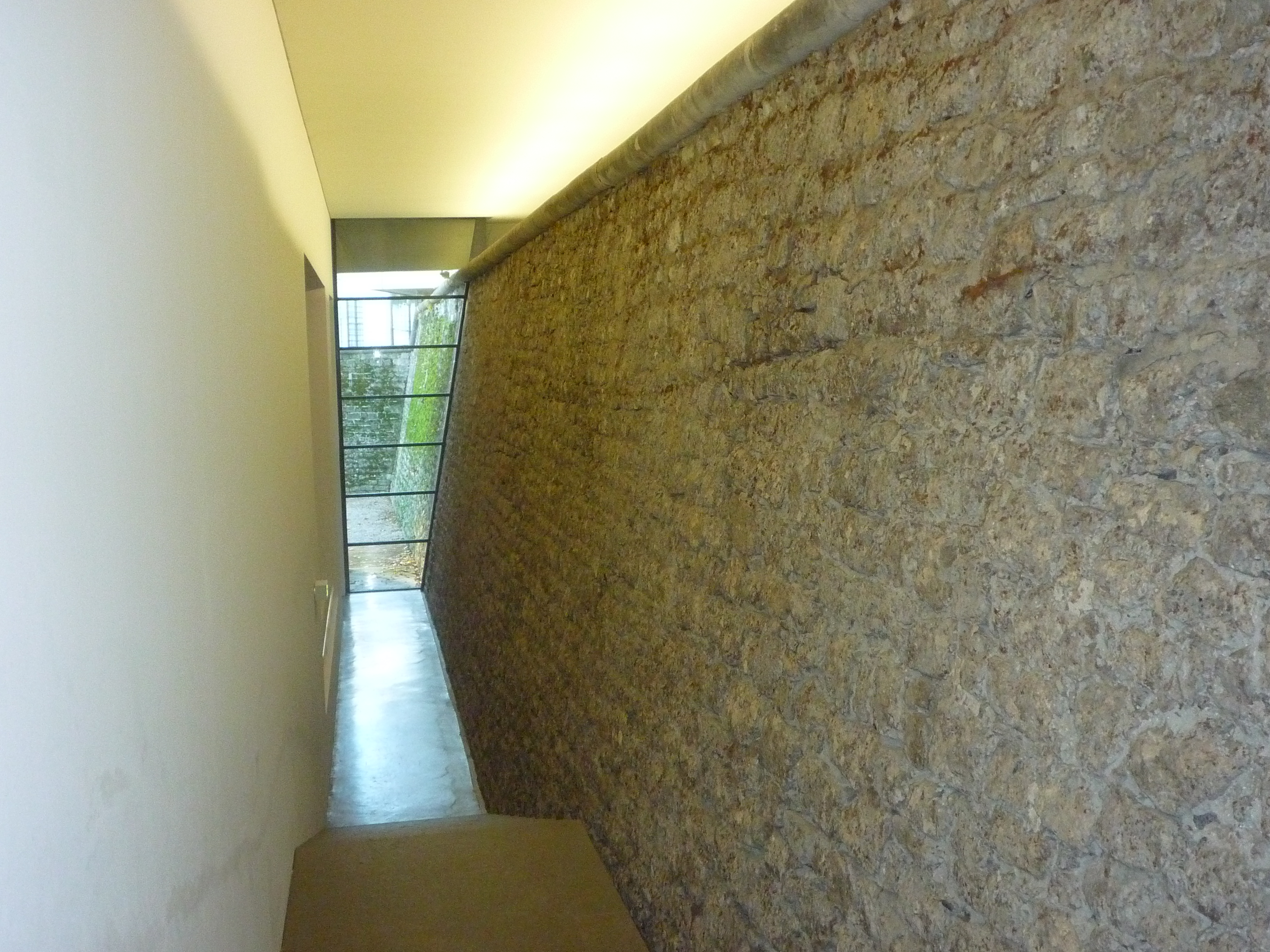 Mur d'enceinte de 1888 intégré à la structure du bâtiment du musée de Grenoble.